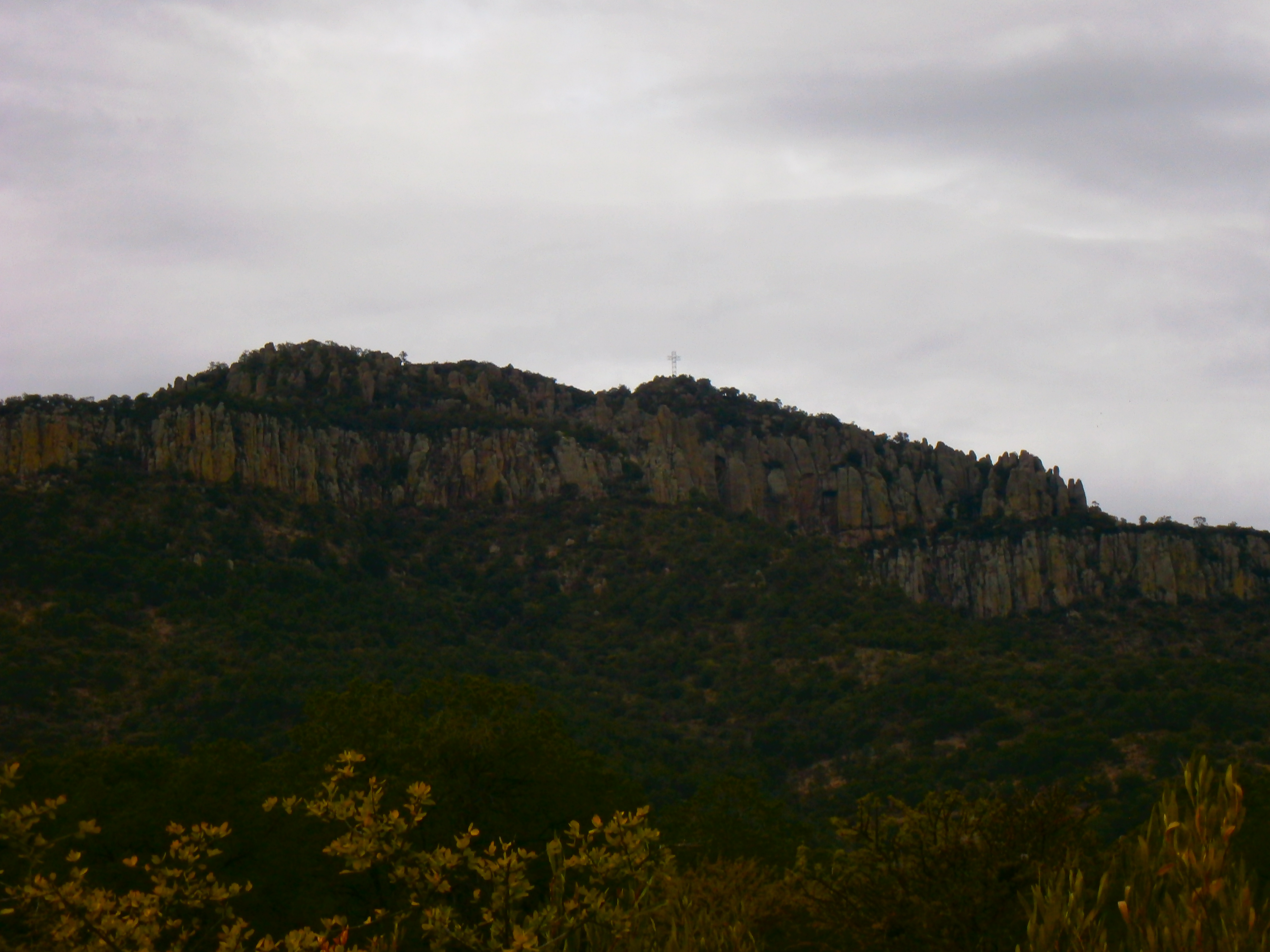 Vista frontal del Cerro de la lechuguilla camino a la Sierra de Valparaiso